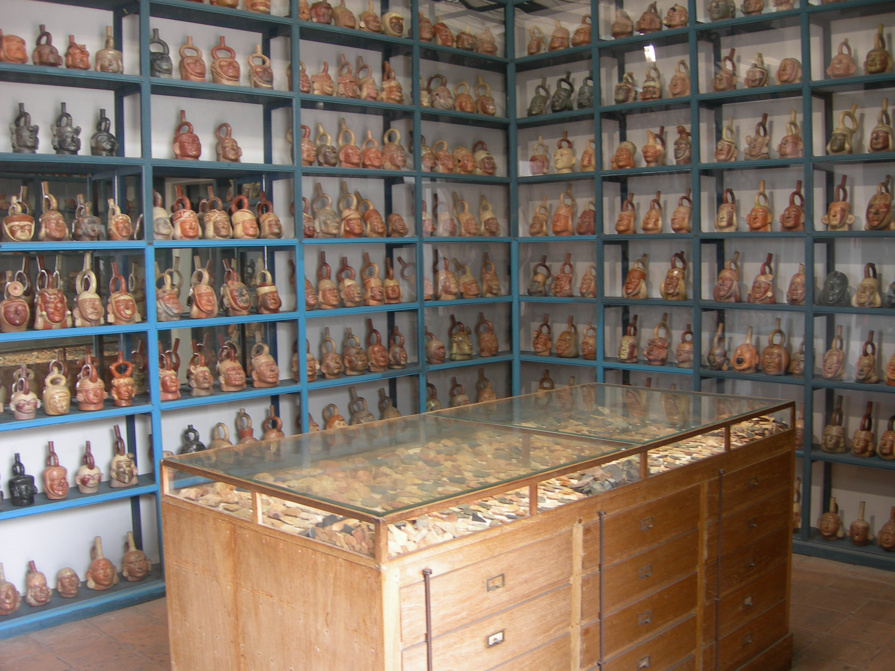 Huacos en el Museo Larco - Lima